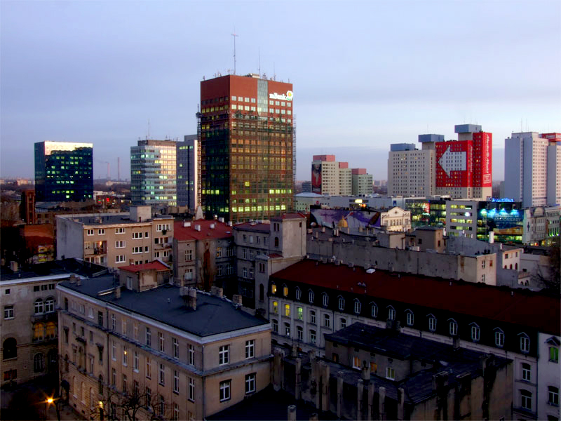 Centrum Łodzi